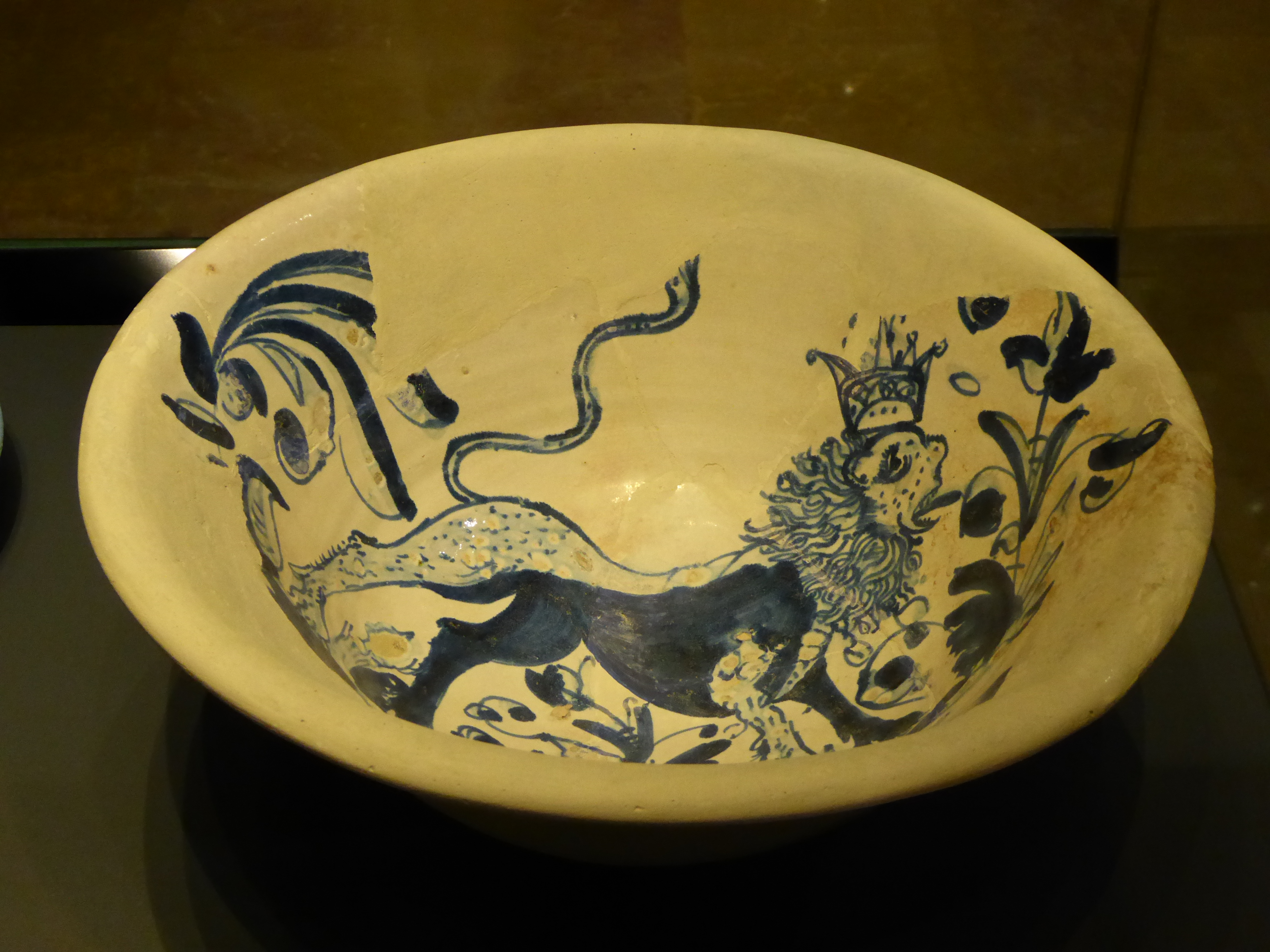 Fuente de cerámica vidriada con decoración de un león coronado en azul, imitando la cerámica de Talavera. Procede de los talleres de Zaragoza o de Muel a mediados del siglo XVII.